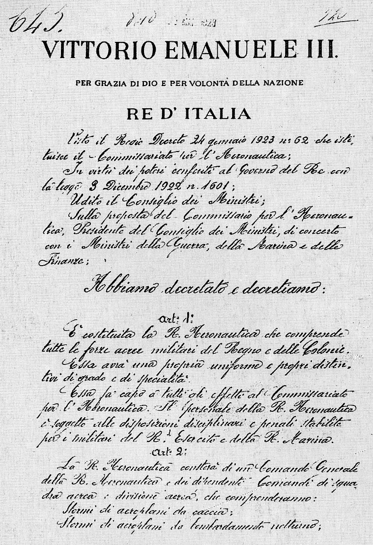 Decreto del Re numero 645, del 24 marzo 1923. Costituituzione della Regia Aeronautica.